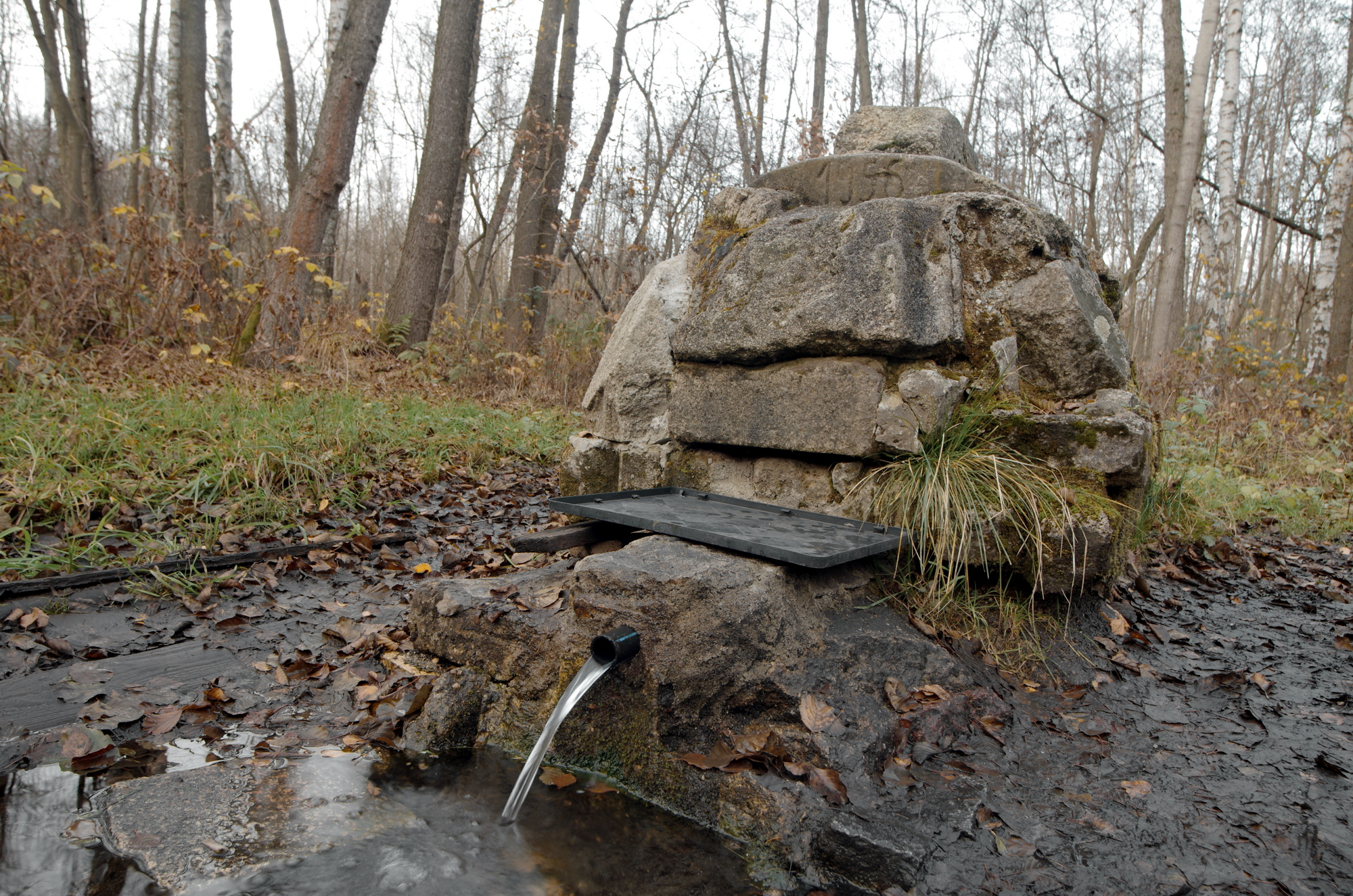 Minerální pramen Pochlovická kyselka v Dolních Pochlovicích (místní část obce Kynšperk nad Ohří), okres Sokolov